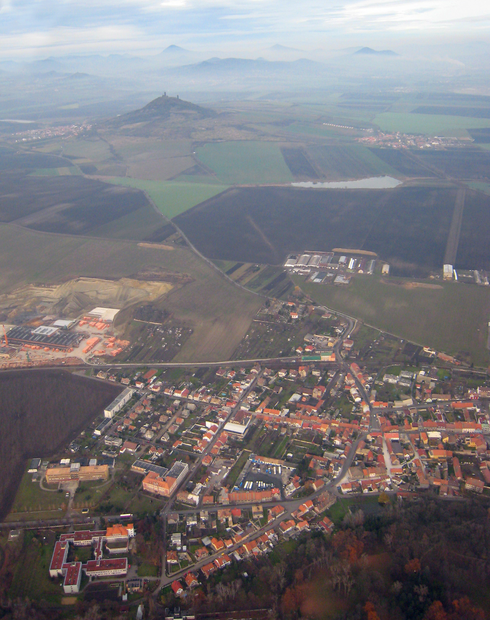 Západní část města Libochovic a hrad Hazmburk nad vsí Klapý. V pozadí vystupují z mlh vrcholy Českého Středohoří s nejvyšší Milešovkou (za Hazmburkem).